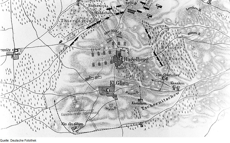 Original image description from the Deutsche Fotothek Belzig-Hagelberg. Plan "Zum Treffen bei Hagelberg 27. Aug. 1813, Ausschnitt